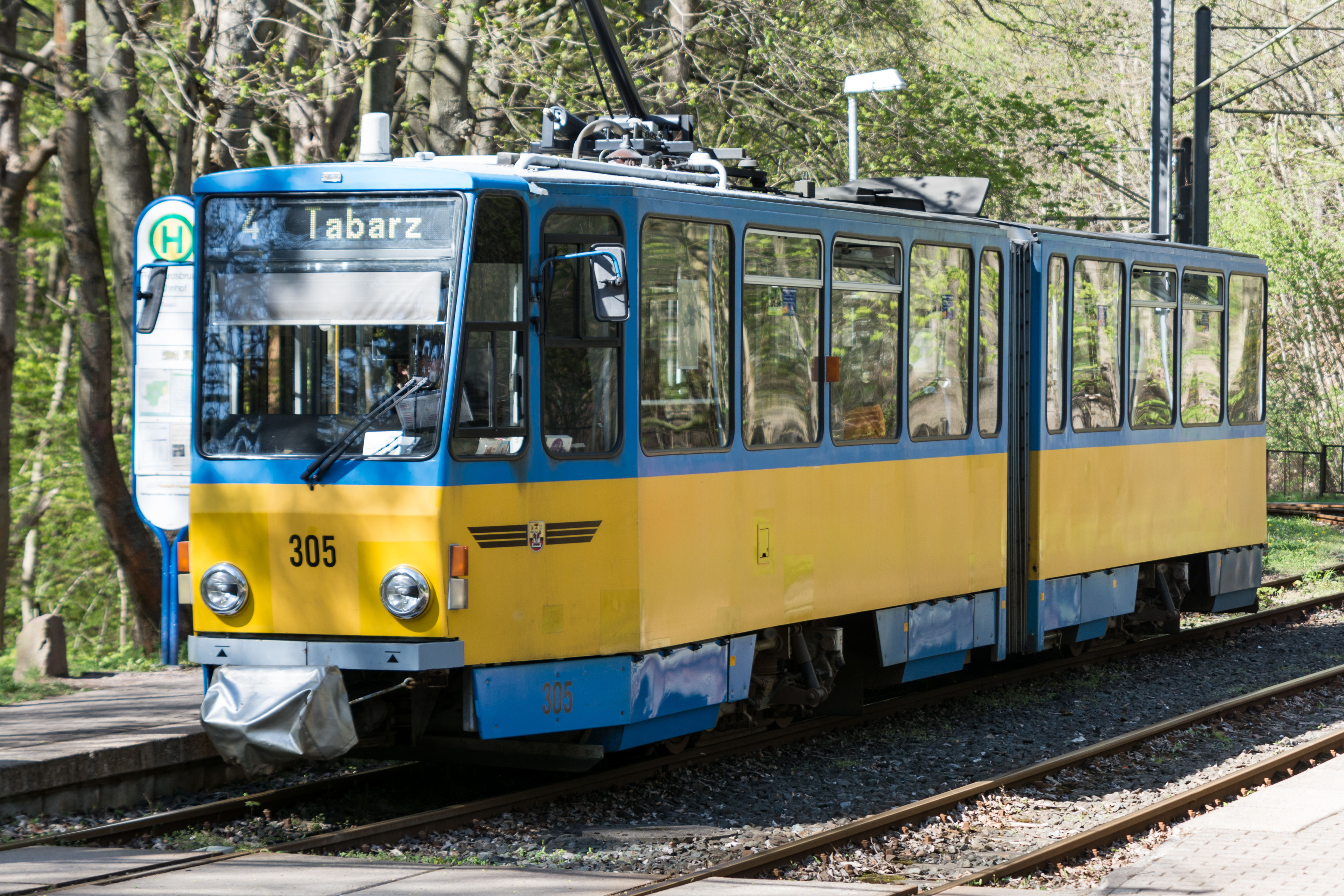 Wagen 305 der Thüringer Waldbahn an der Haltestelle Reinhardsbrunn Bahnhof in Friedrichroda.